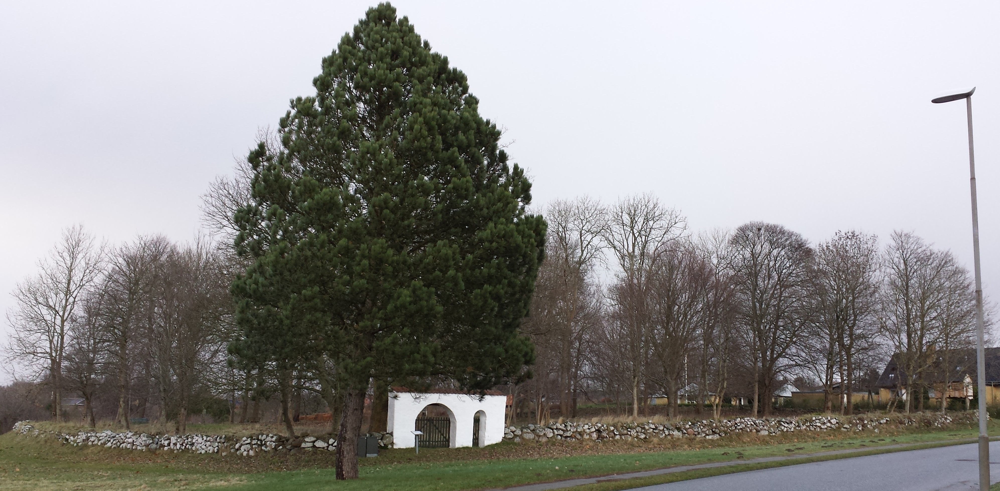 Kirkegården ved Gammel Essenbæk Kirke.